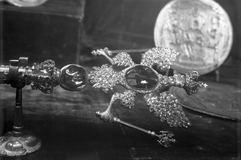 Die preussischen Kroninsignien im Hohenzollernmuseum in Berlin ! (Erstmalig gestattete Aufnahmen) Im Hohenzollernmuseum in Berlin werden dem Publikum in einem Tresorraum die preussischen Kroninsignien, Zepter, Reichsapfel, Totenhelm, Kurhut und Reichssiegel gezeigt. Die wertvollen Stücke stehen unter ständiger Bewachung. Der mit zwei grossen Rubinen und vielen kleineren Brillianten geschmückte Adlerkopf des Zepters des ehemaligen Kaisers.